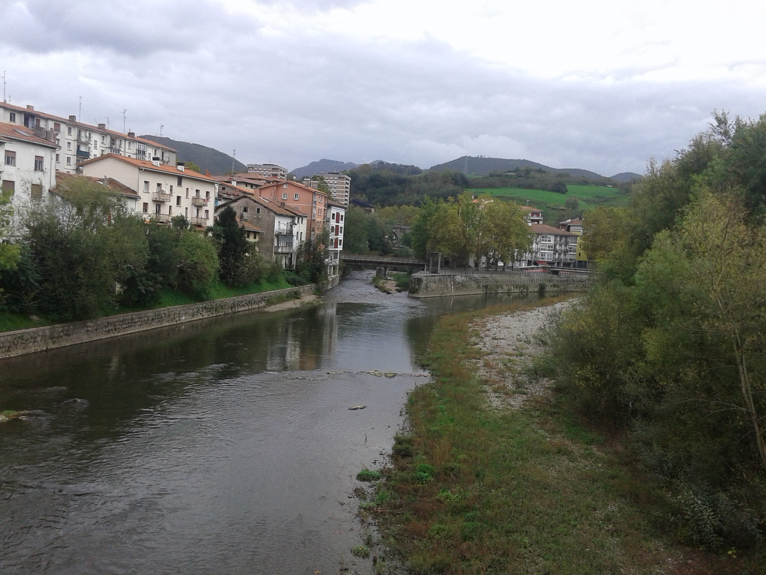 Puntu horretan bi ibaiek bat egiten dute.